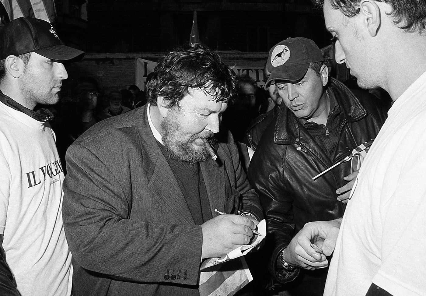 Giuliano Ferrara firma copie del Foglio